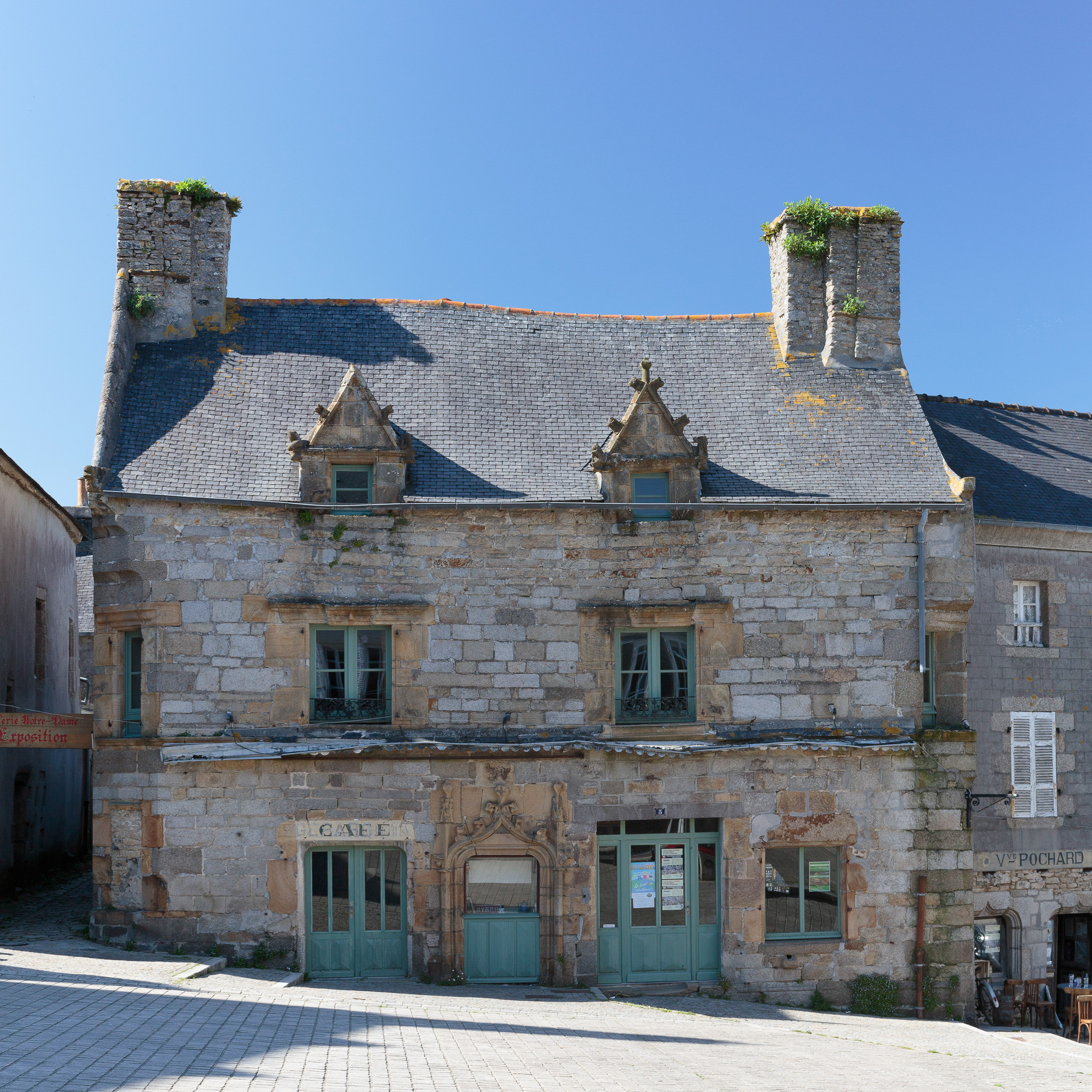 Maison Gérard - inscrite aux Monuments Historiques .